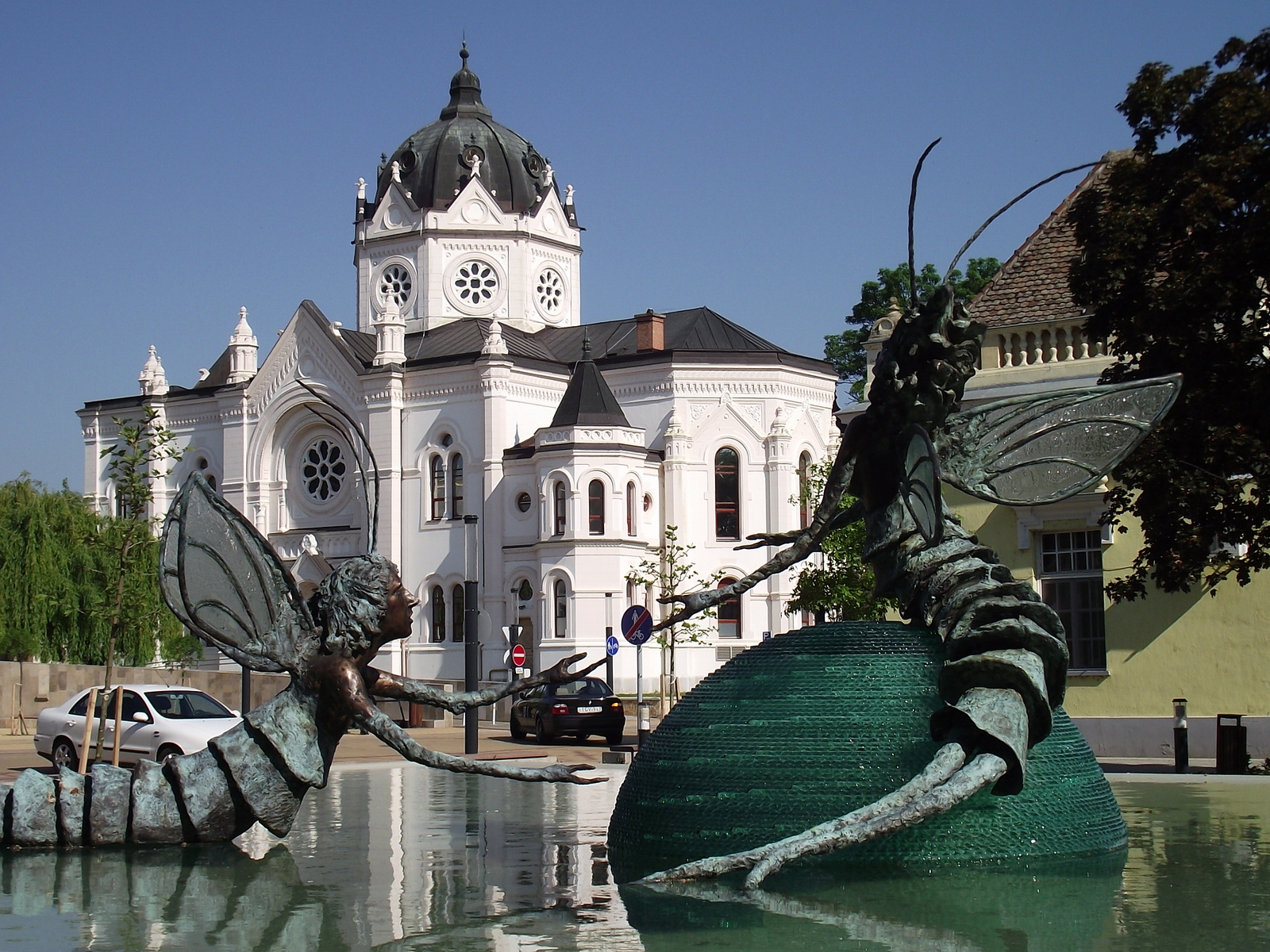 zsinagóga (Szolnok, Templom út 2.)